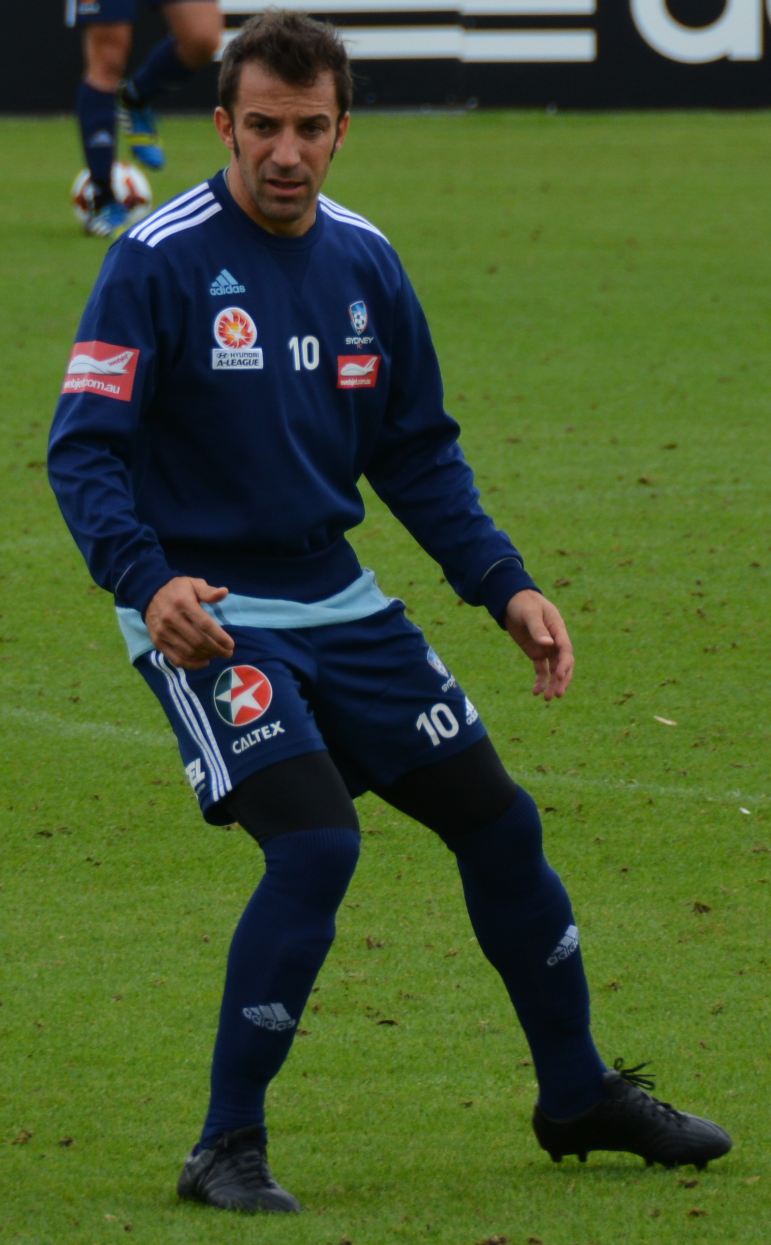 Photo by Pete Nowakowski